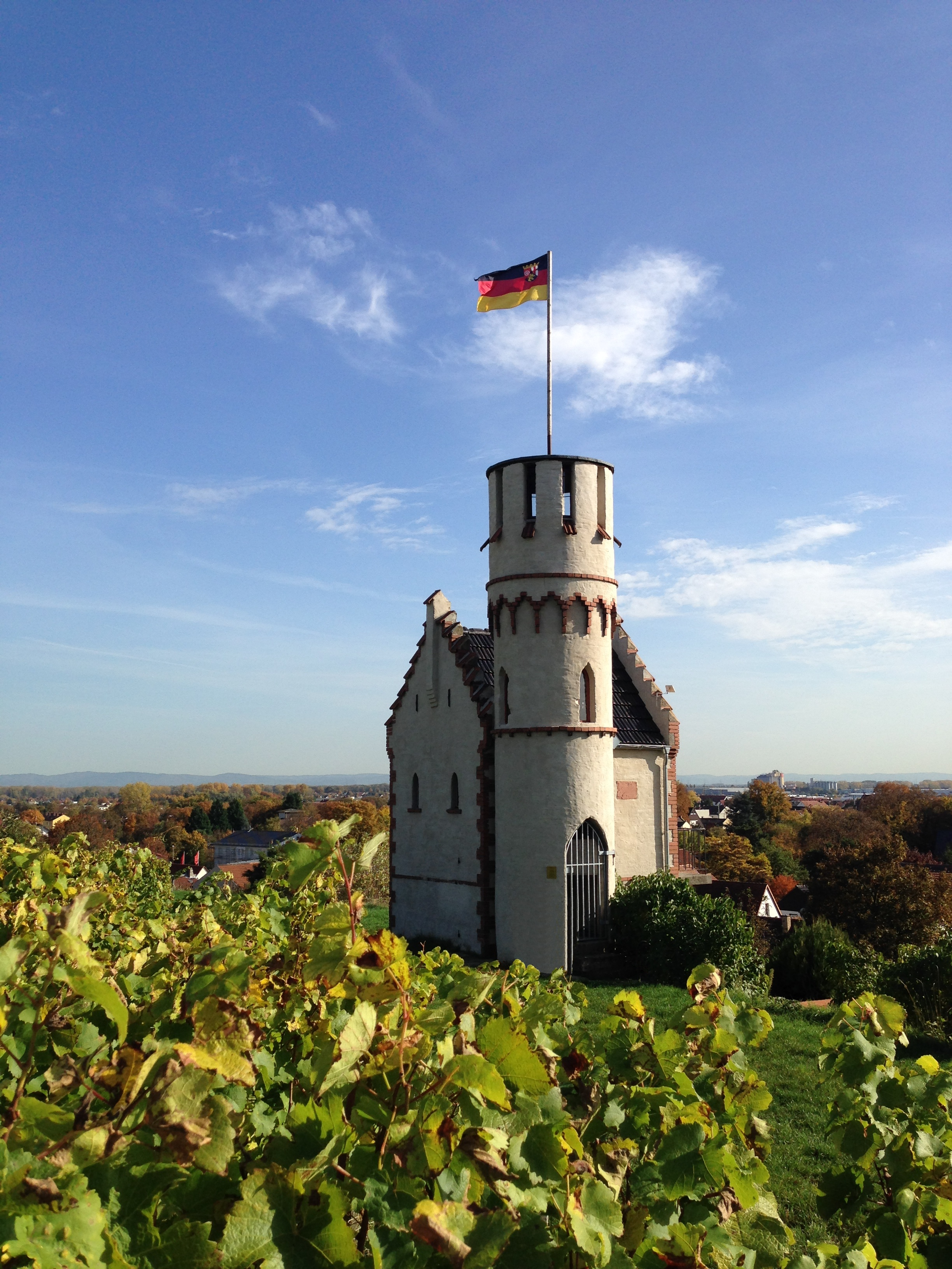 Miniaturburg Leckzapfen, Osthofen